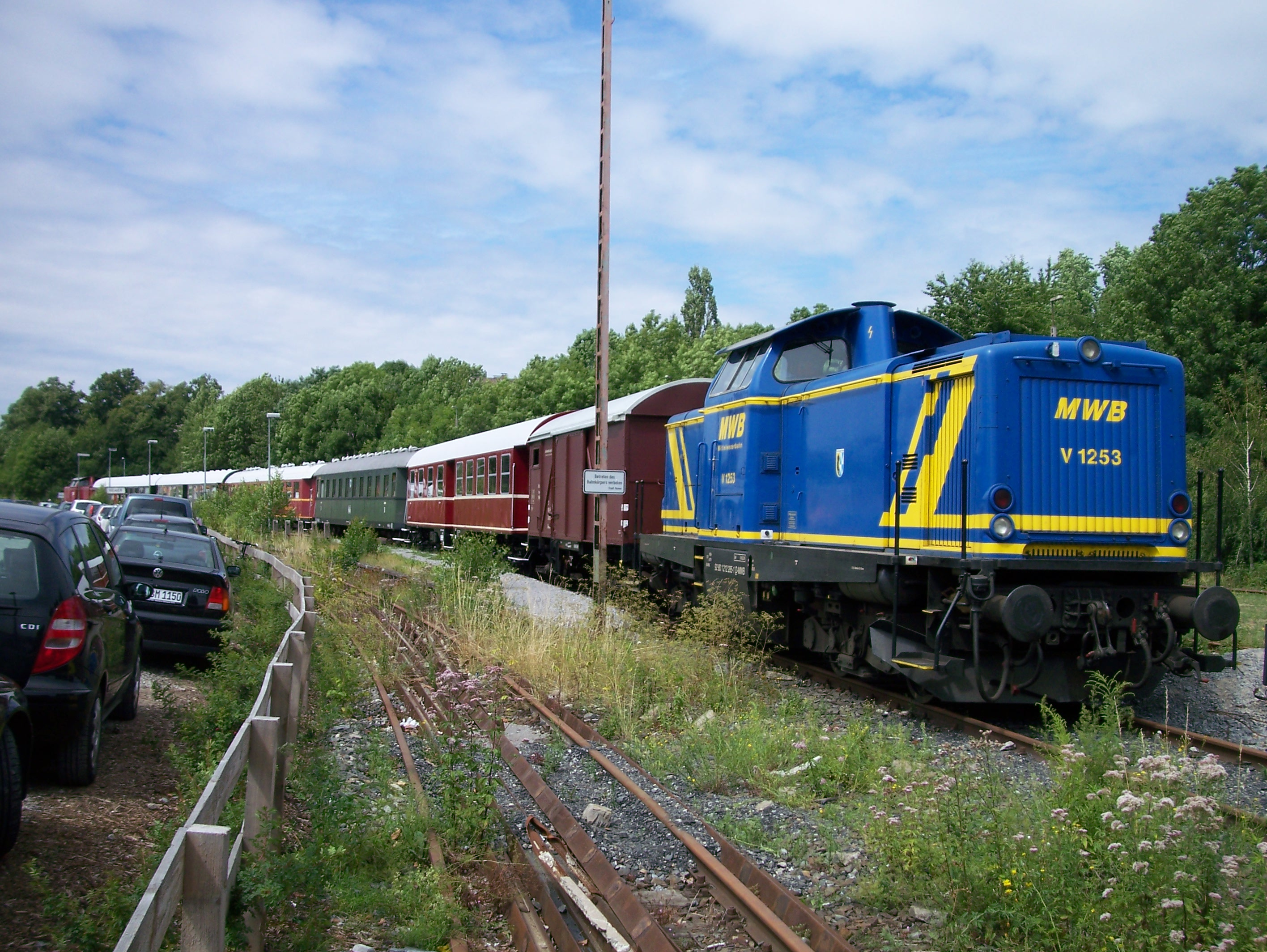 Sonderzug der Landeseisenbahn Lippe am 31.07.2010 in Hemer. Grund der Fahrt war die Landesgartenschau 2010, der Zug brachte ca. 180 Reisende aus Lemgo, Lage und Detmold nach Hemer.